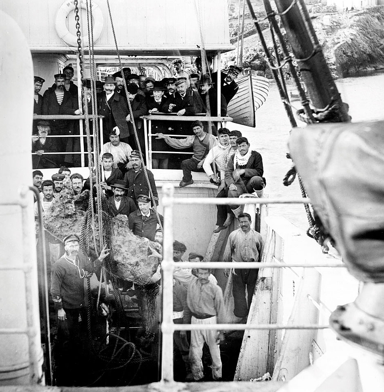 Vertreter der griechischen Regierung, der Besatzung und der Schwammtaucher auf dem Deck des griechischen Marineschiffs Mykali im Winter 1900/1901 über dem Schiffswrack vor Antikythera